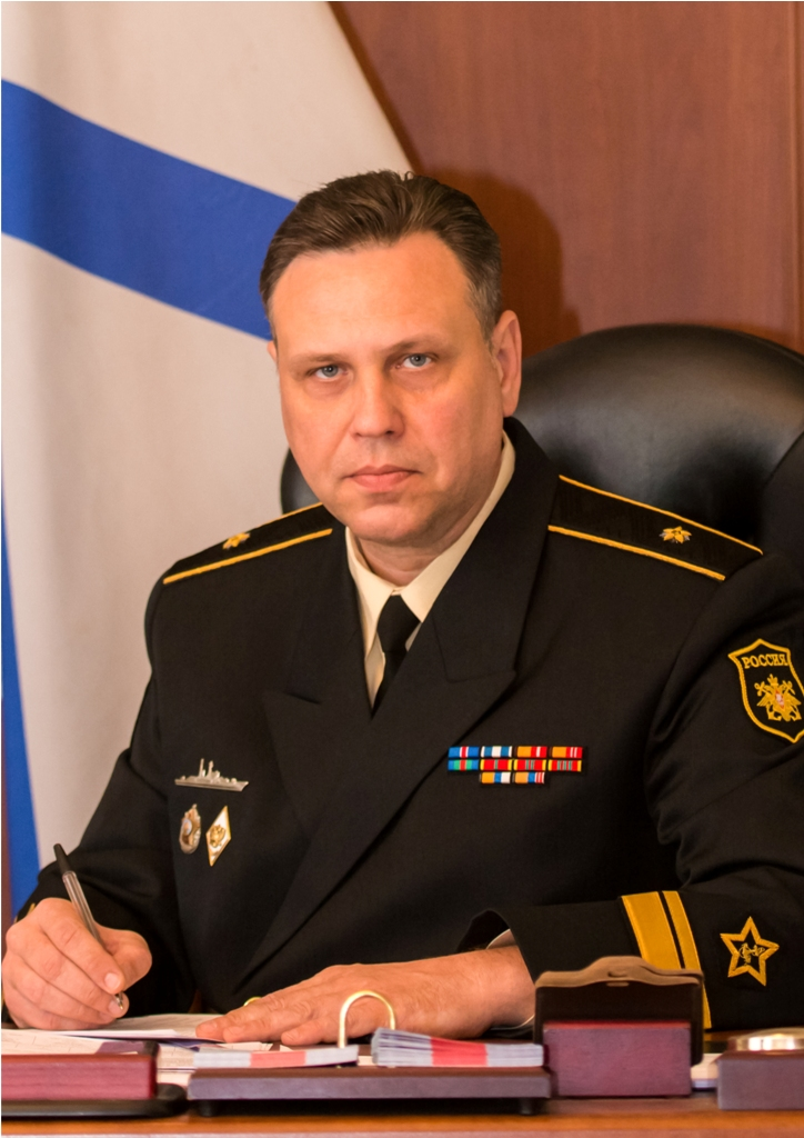 Командующий Каспийской флотилией контр-адмирал Сергей Пинчук